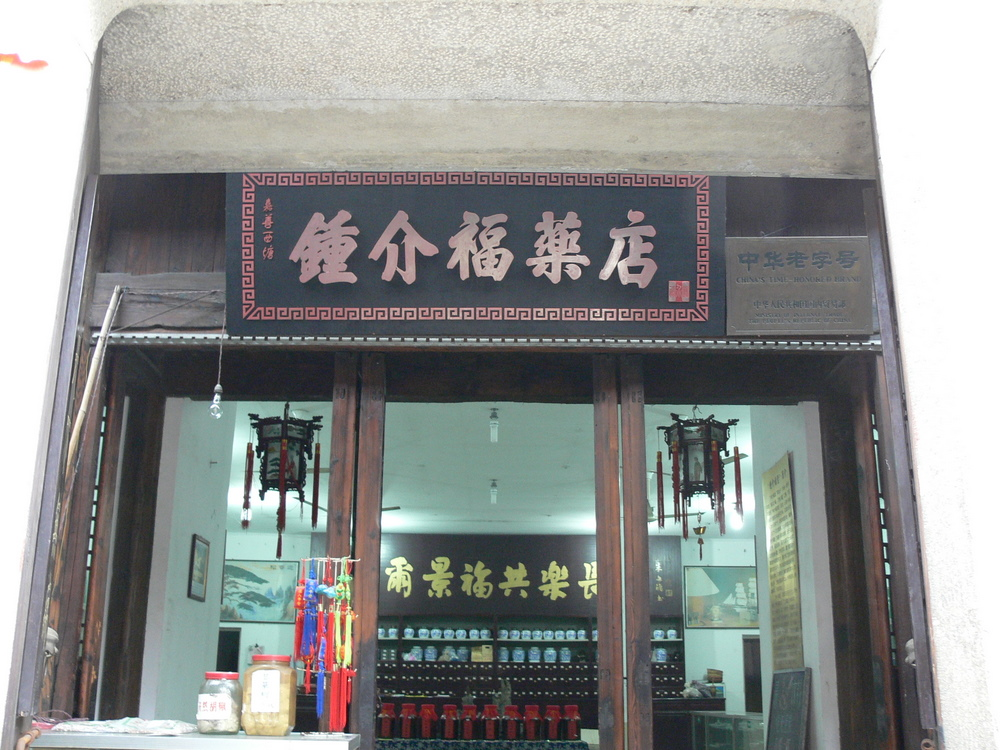 西塘鍾介福药店